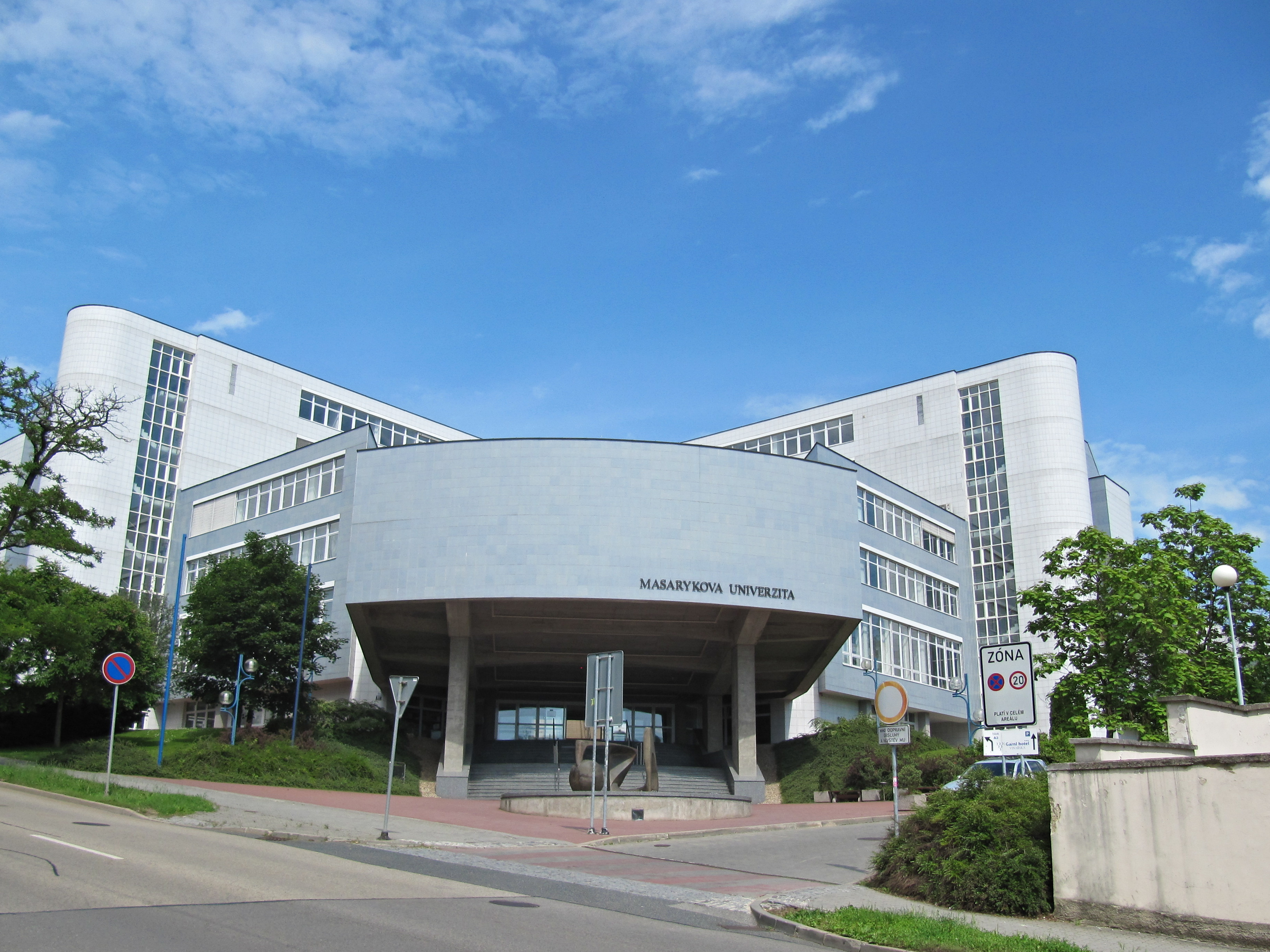 Brno, Masarykova univerzita, Fakulta ekonomicko-správní. Lipová 507/41a, Brno-Pisárky